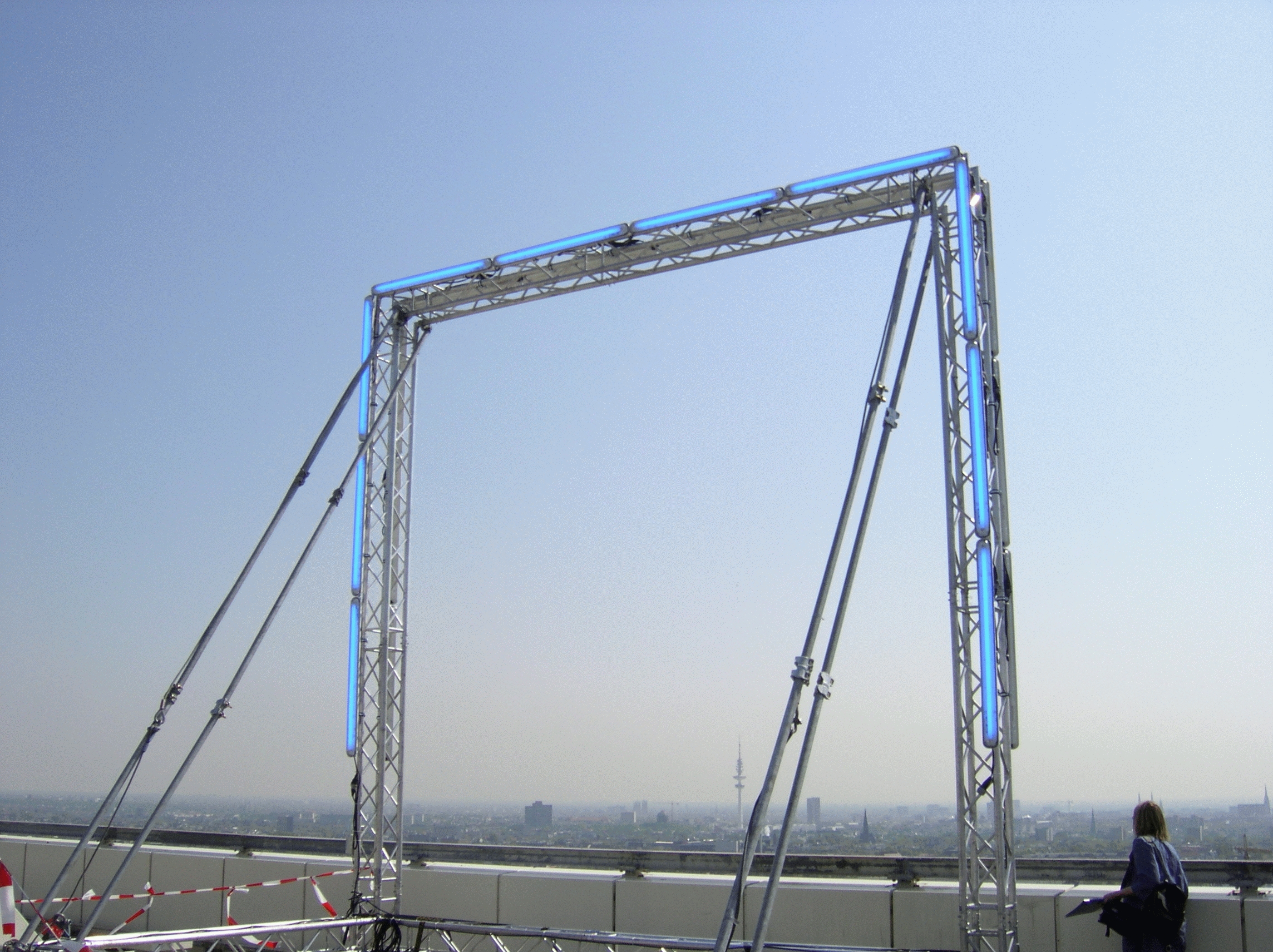 Höchstes Blue Goal in Hamburg auf dem Dach der Euler Hermes Kreditversicherungs-AG.